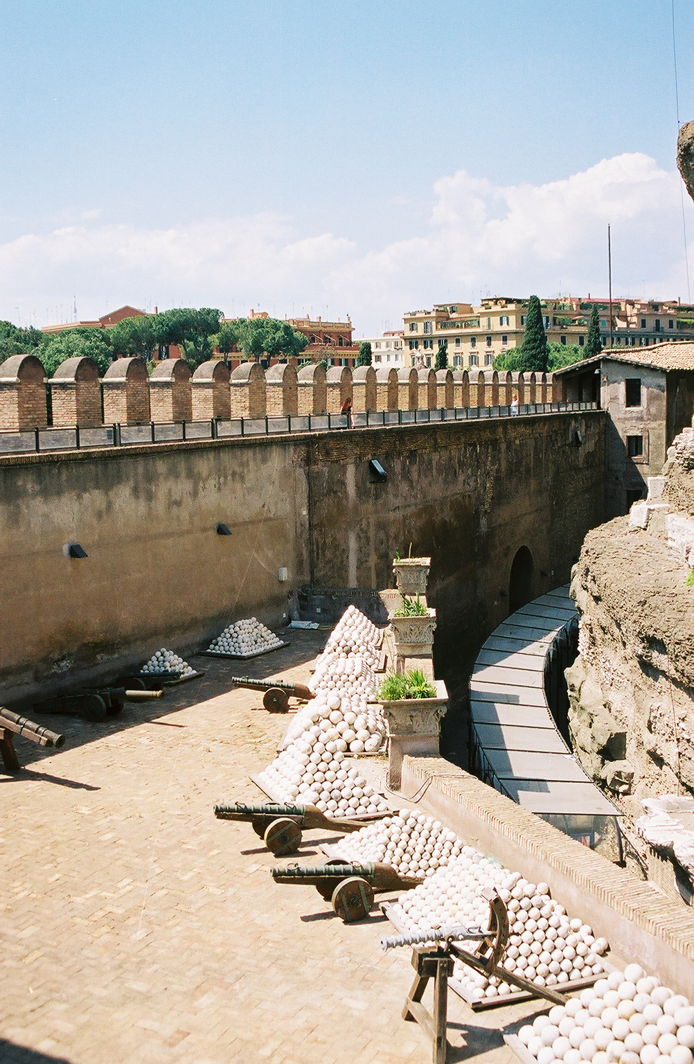 Castyel Sant'Angelo, Roma, Italy.